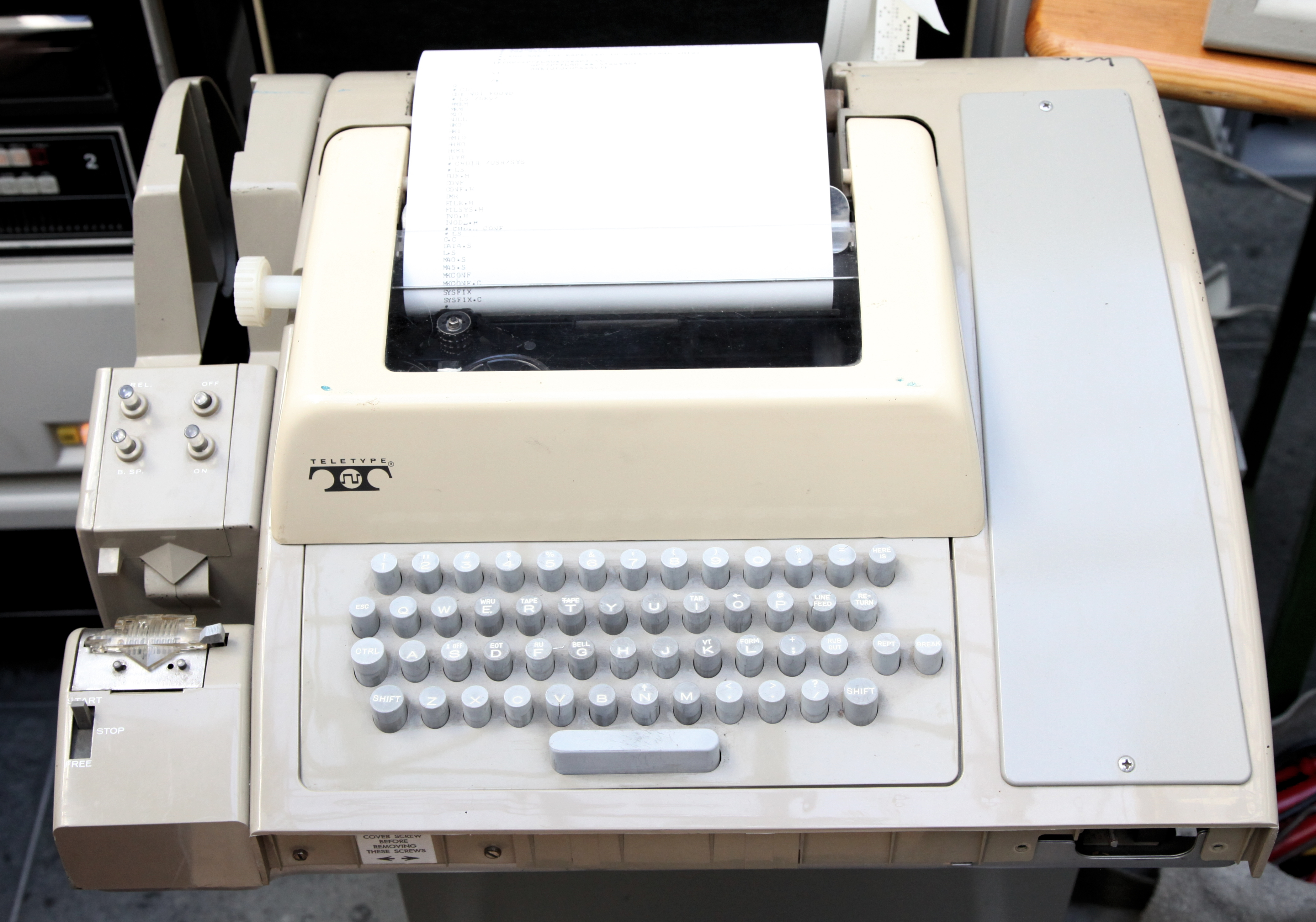 Teletype terminal